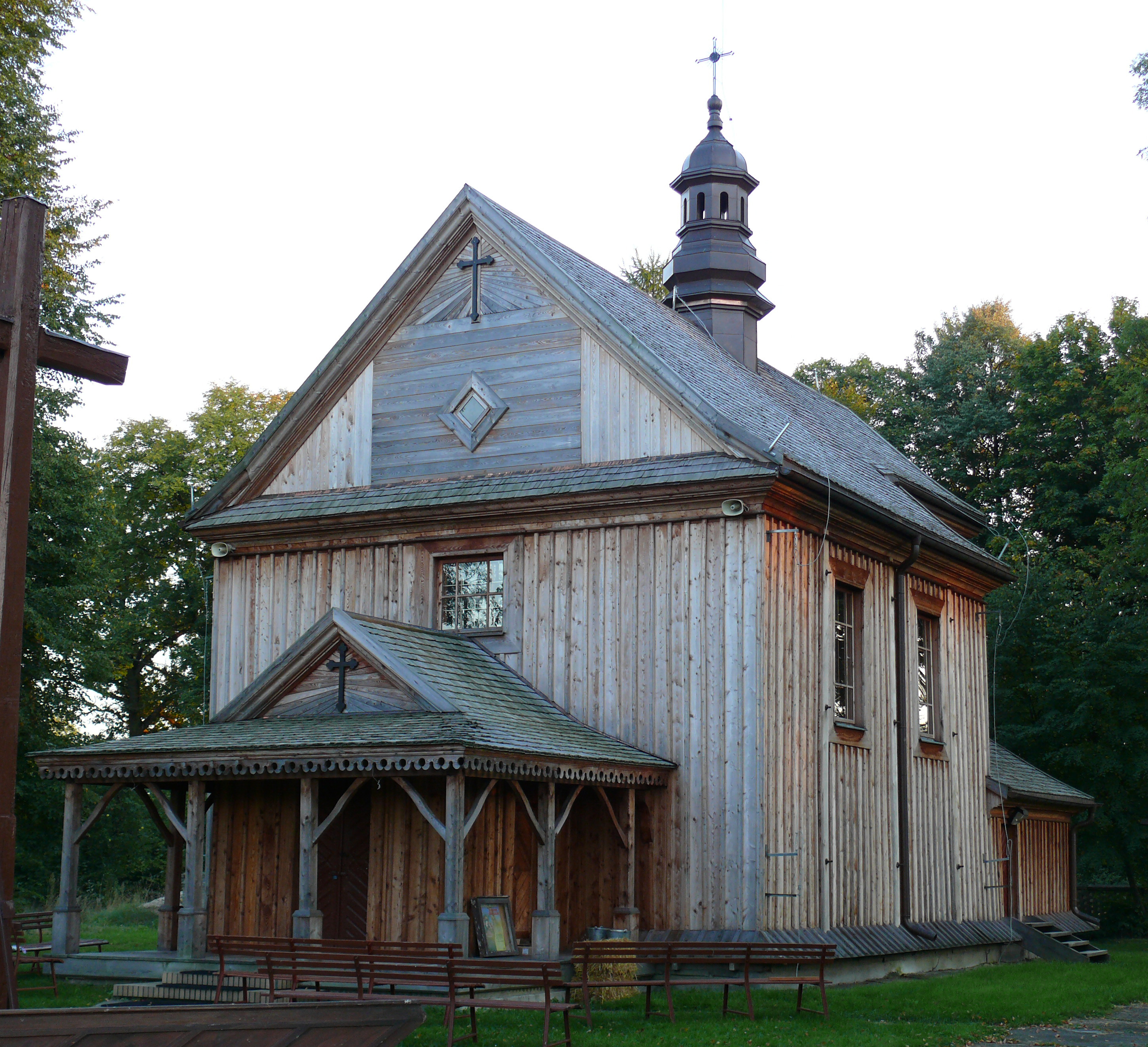 Dawna cerkiew greko-katolicka, obecnie kościół rzymsko-katolicki pod wezwaniem św. Michała Archanioła (1739r.) w miejscowości Witoroż, gmina Drelów, powiat bialski, woj. lubelskie (Zabytek nr. A/114 z 03.03.1960)